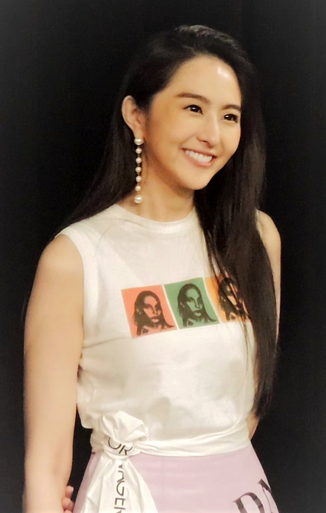 【大學畢業典禮歡迎你】粉絲見面會